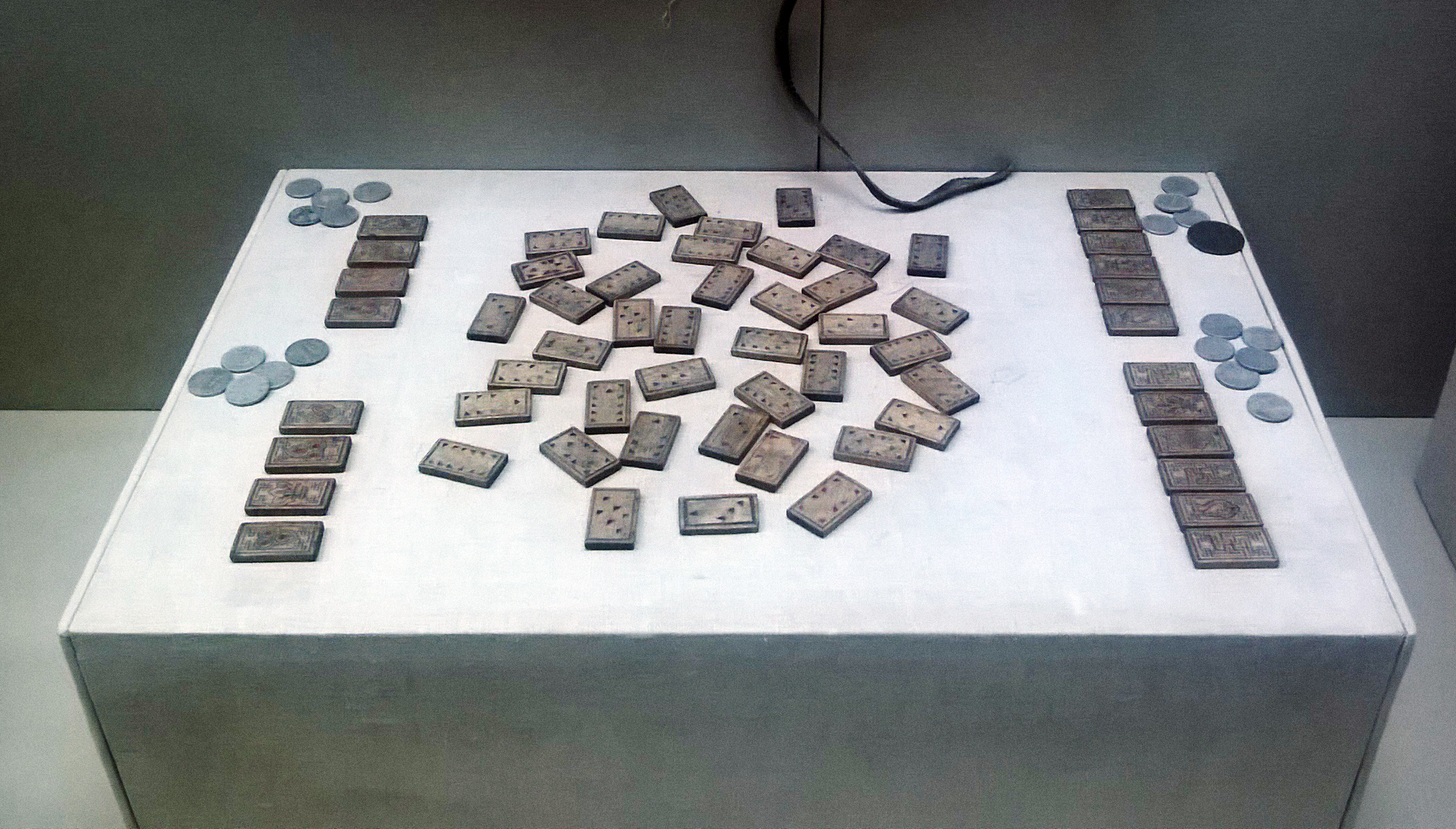 内蒙古博物院藏。